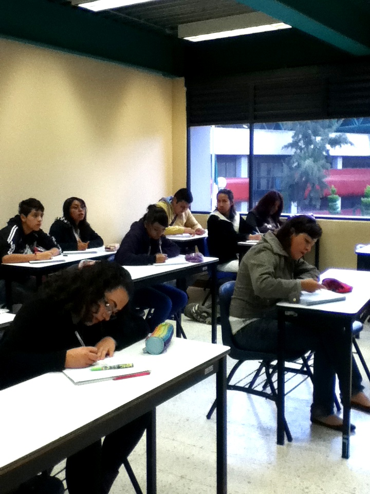 Sistema de Bachillerato del Gobierno del Distrito Federal. Instituto de Educación Media Superior (IEMS)